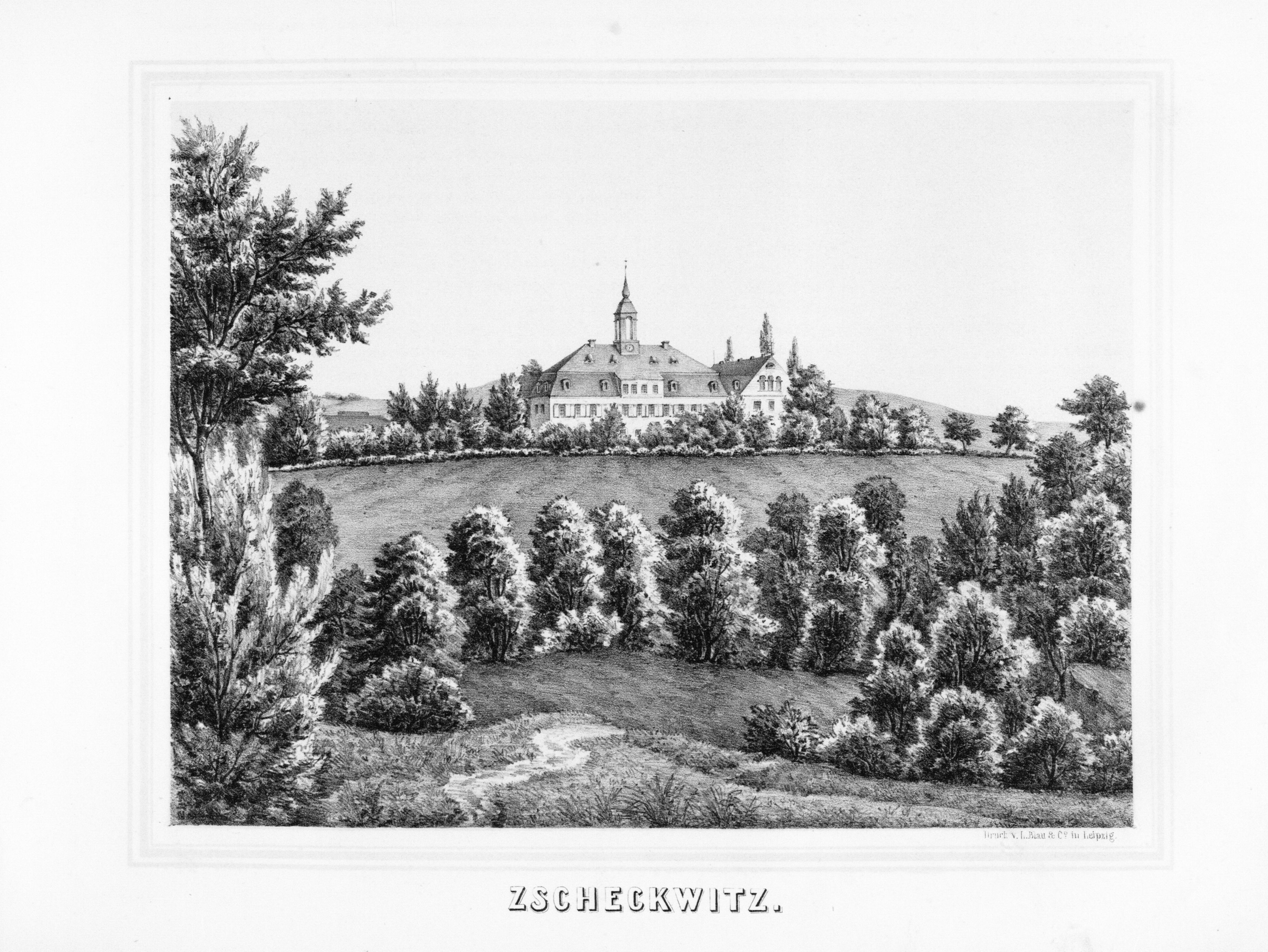 Zscheckwitz aus: Album der Rittergüter und Schlösser im Königreiche Sachsen Meissner Kreis Section: II